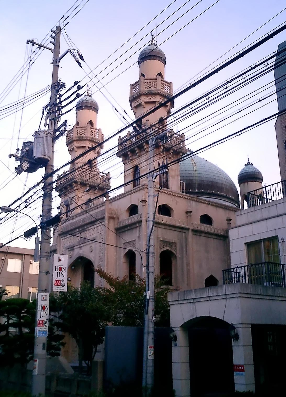 Kobe-mosque